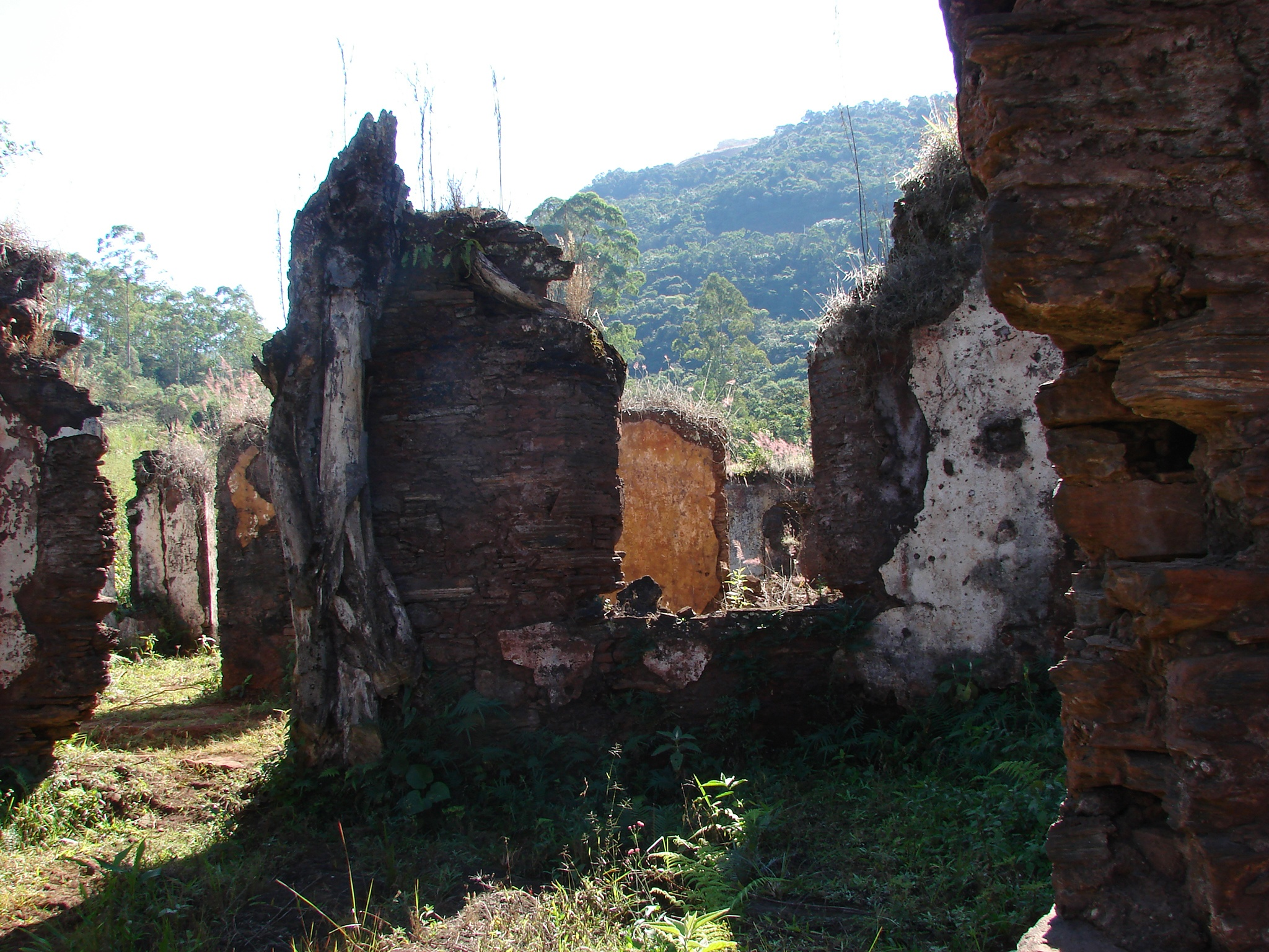 A mina de Gongo Soco tornou-se célebre por volta de 1830 pelo seu minério aurífero de alto teor. Em 30 anos (1826-1856) a companhia inglesa Imperial Brazilian Mining Associatíon produziu 12.887 kg de ouro.